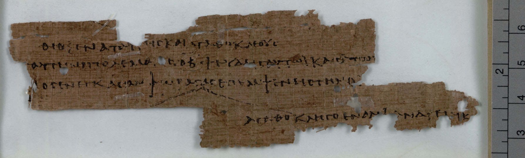 Папірус Oxy. XXXVII 2821, Sackler Library, Oxford